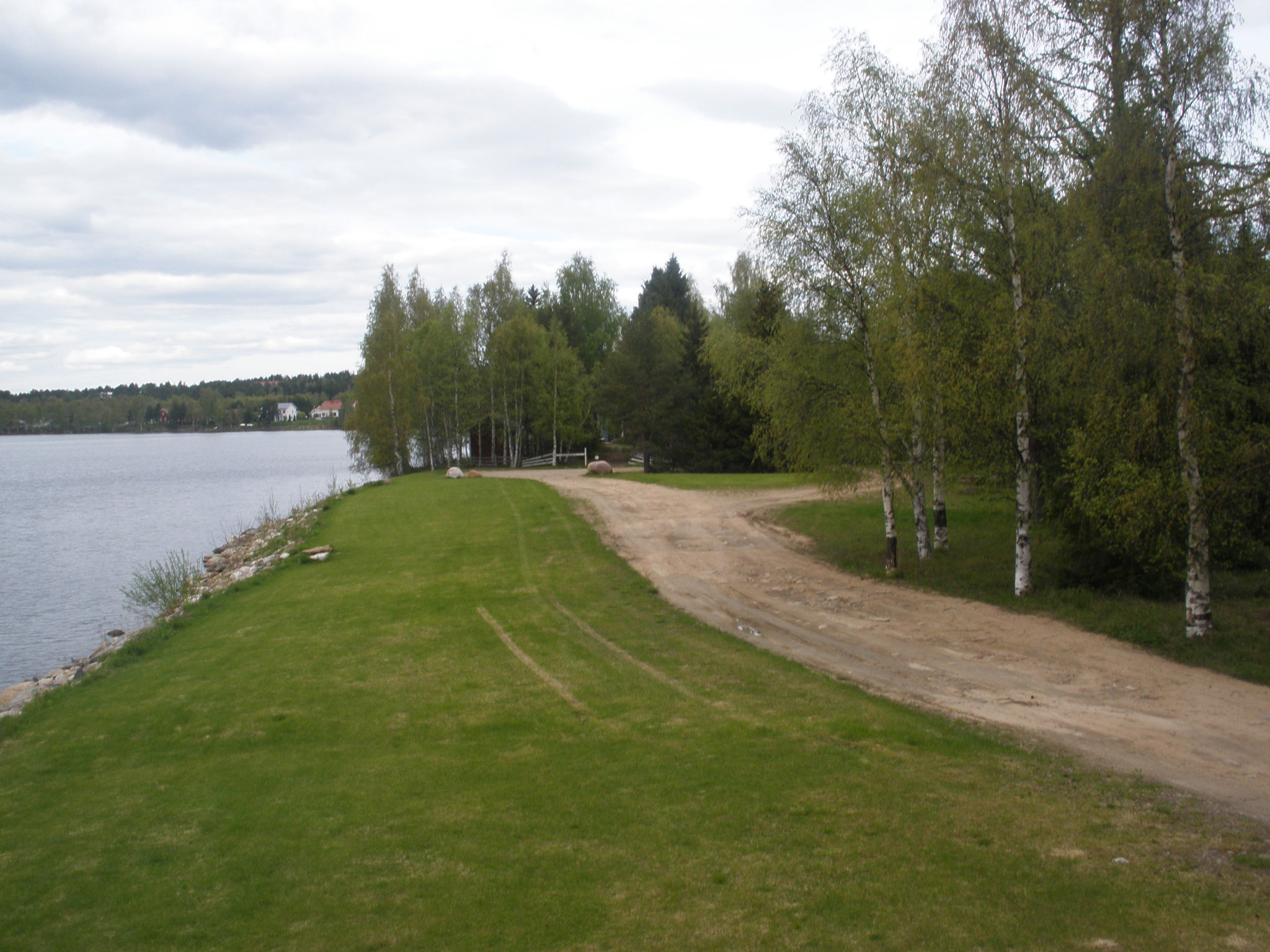 Kukanniemi Rovaniemellä kesäkuussa 2012 laavulta kuvattuna.